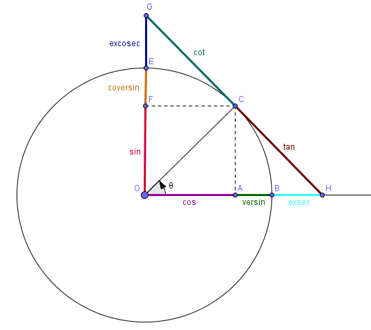 De goniometrische cirkel met aanduidingen van frequente en minder frequente goniometrische getallen.